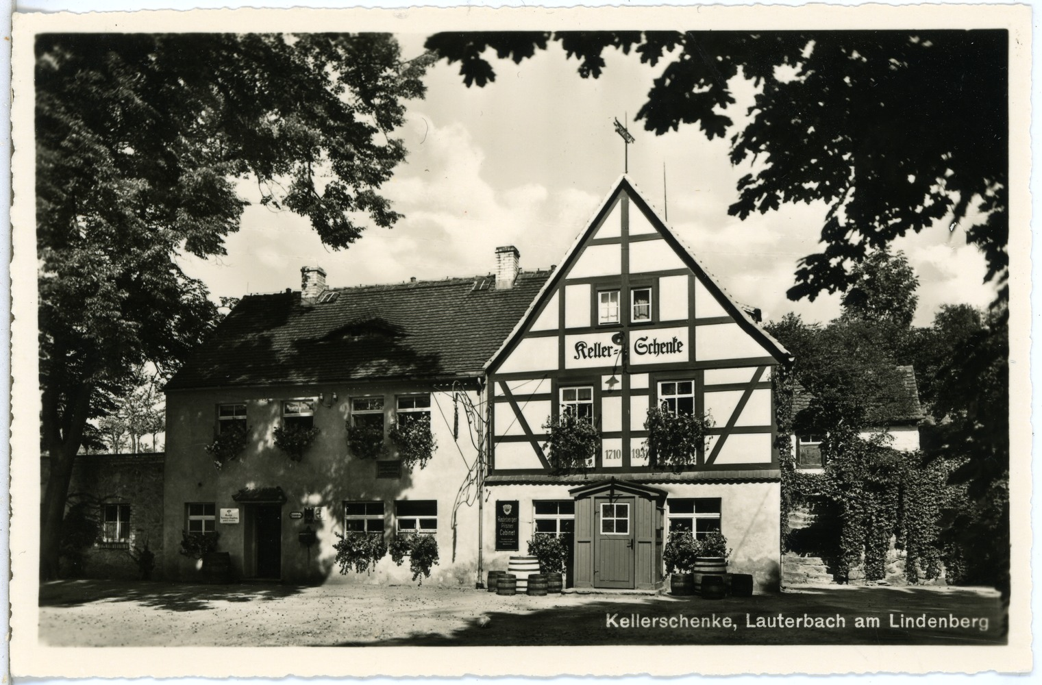 Lauterbach; Kellerschänke This postcard is from publisher Brück & Sohn in Meißen ( postcard has a unique number 27192 and is available in a higher resolution at the publisher. This images was uploaded in a cooperation project between Wikipedians and the publisher.